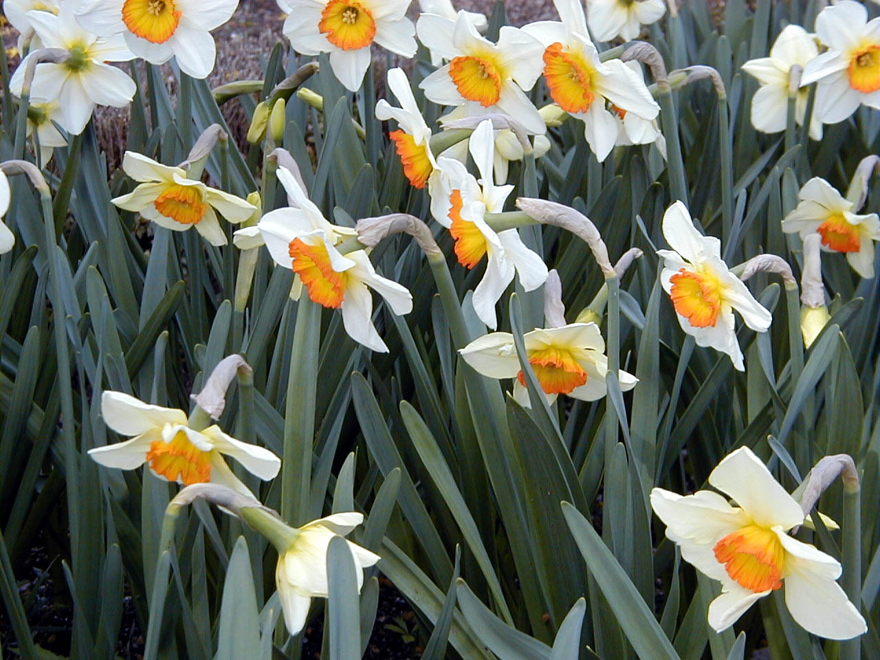 Narcissus 'Flower Record'. Real Jardín Botánico, Madrid